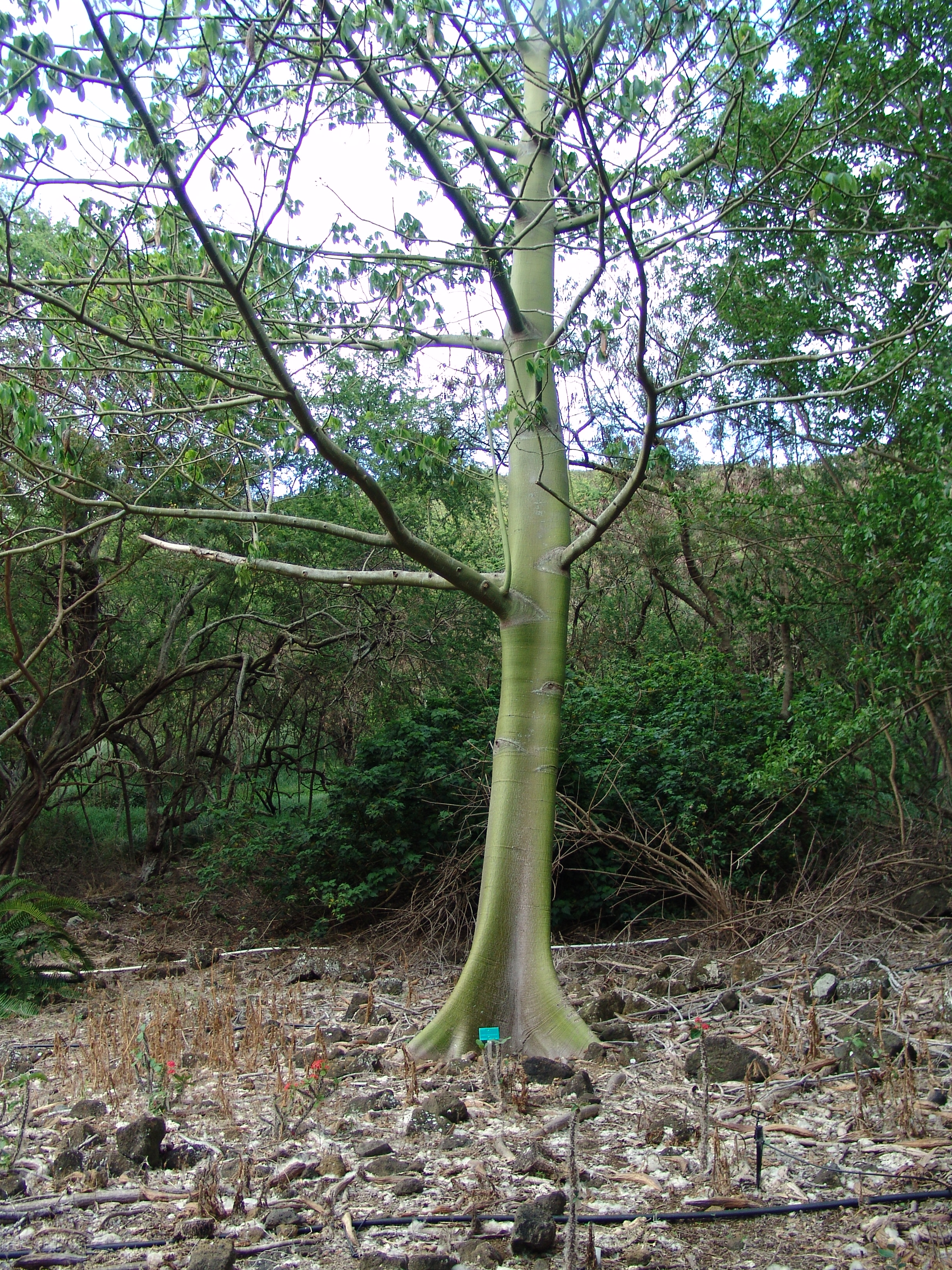 Koko Crater Botanical Garden Oahu Hawaii